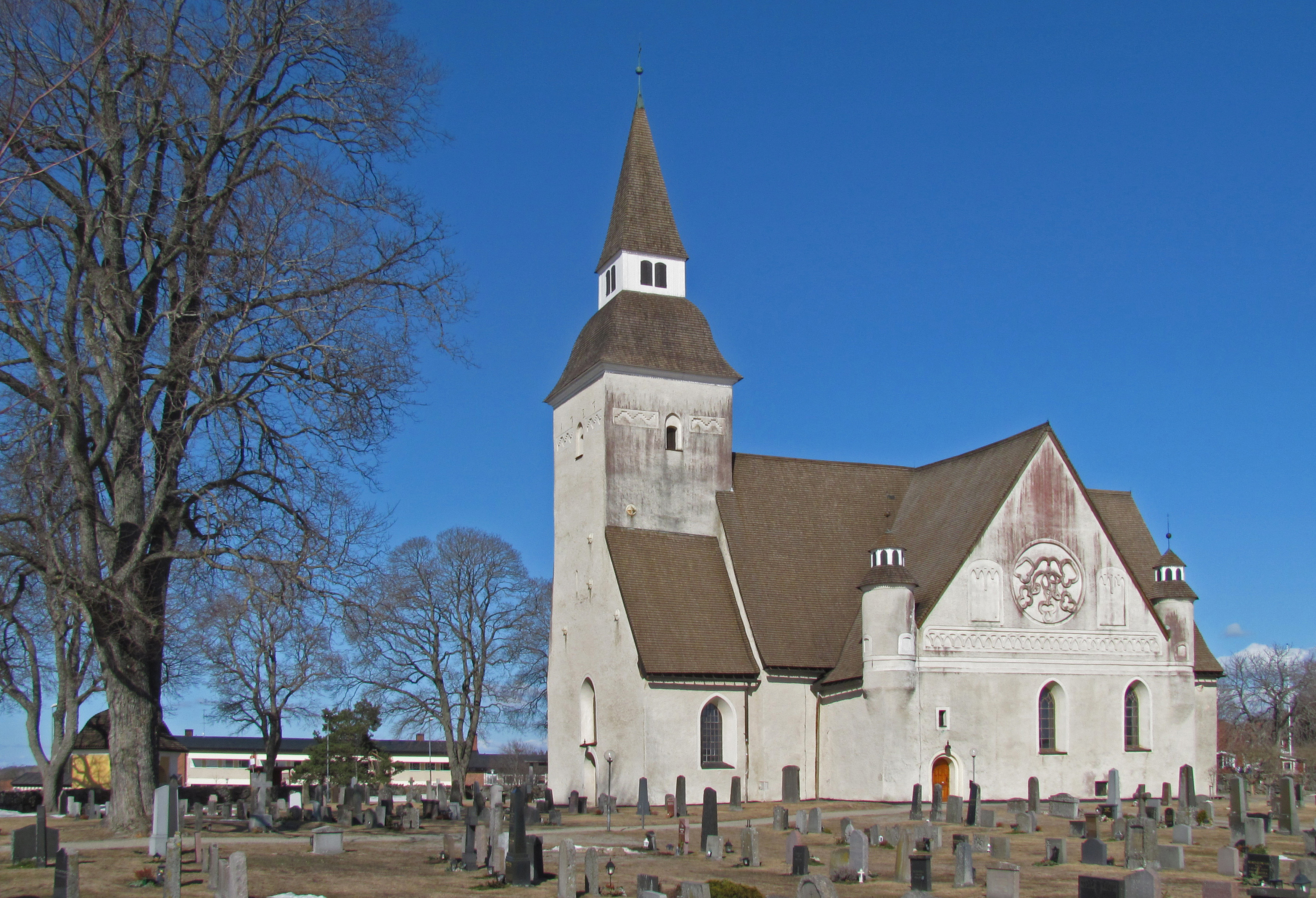 Sorunda kyrka